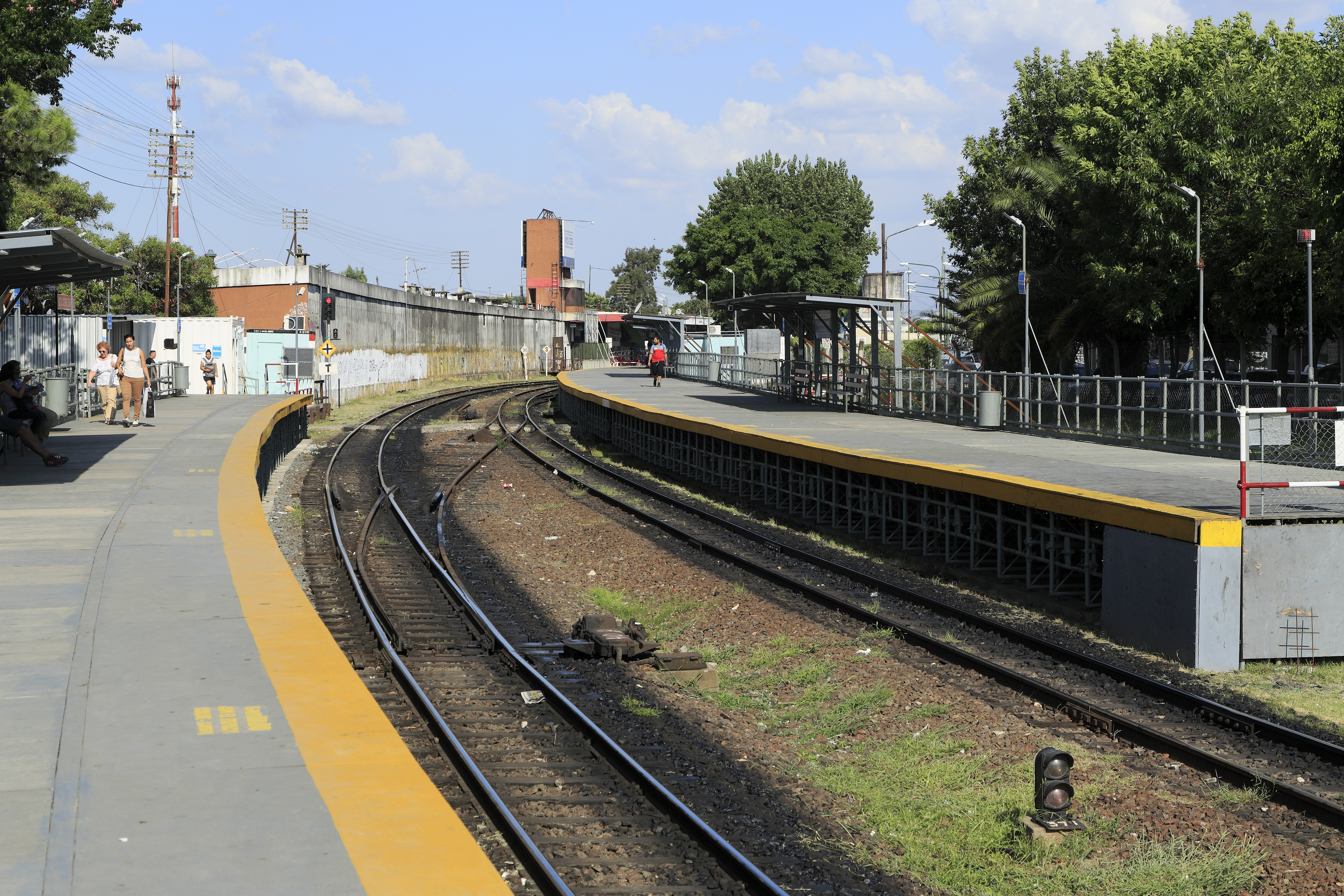 Richtung Retiro, die eigentlichen Bahnsteige liegen im Hintergrund südlich der Avenida Avelino Rolón. Wie auf der gesamten Strecke werden sie im Sommer 2018/2019 auf etwa einem Meter erhöht, um für den S-Bahn-Dienst stufenfreie Einstiegsverhältnisse realisieren zu können. Die Weichenverbindung ist unbefahrbar, allerdings wäre sie wegen der Bahnsteigkanten, die man sonst zurückschneiden müsste, aus Profilgründen ohnehin unbefahrbar.Die ehemalige Stadt Boulogne sur Mer erhielt ihren Namen nach dem französischen Boulogne-sur-Mer, nachdem der argentinische General José de San Martín dort am 17. August 1850 gestorben war.